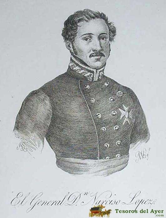 Narciso Lopez con los grados de general